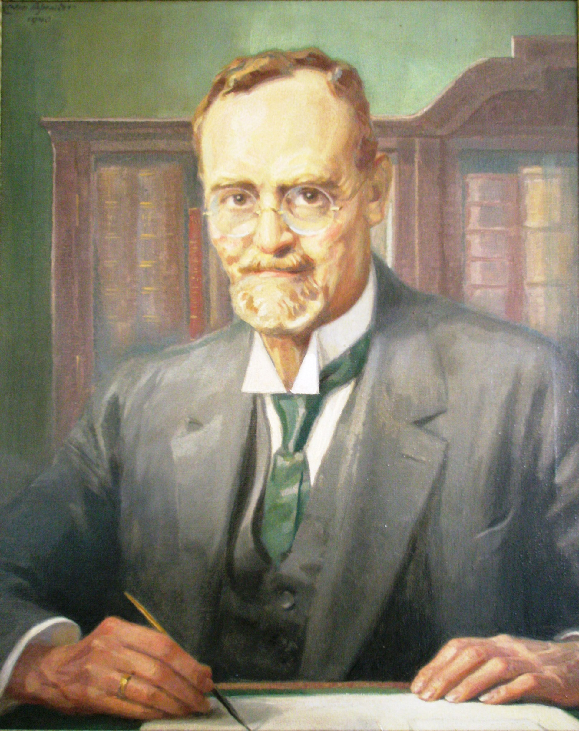 Wolgang Haase, Präsident des evang. Oberkirchenrates